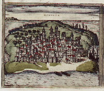 Mombaza (Mombasa)